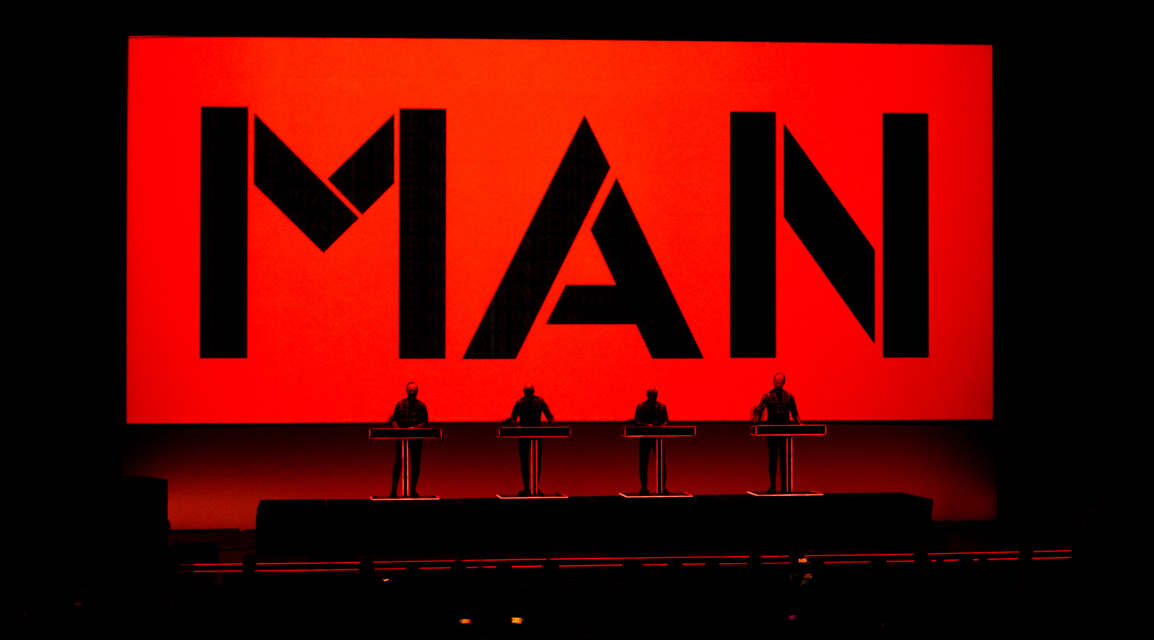 KraftwerkRAH210617-7